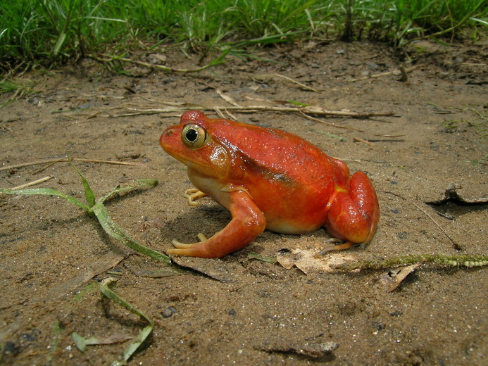 Dyscophus antongilii